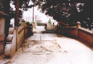 粵語: 石井橋圖 經處理